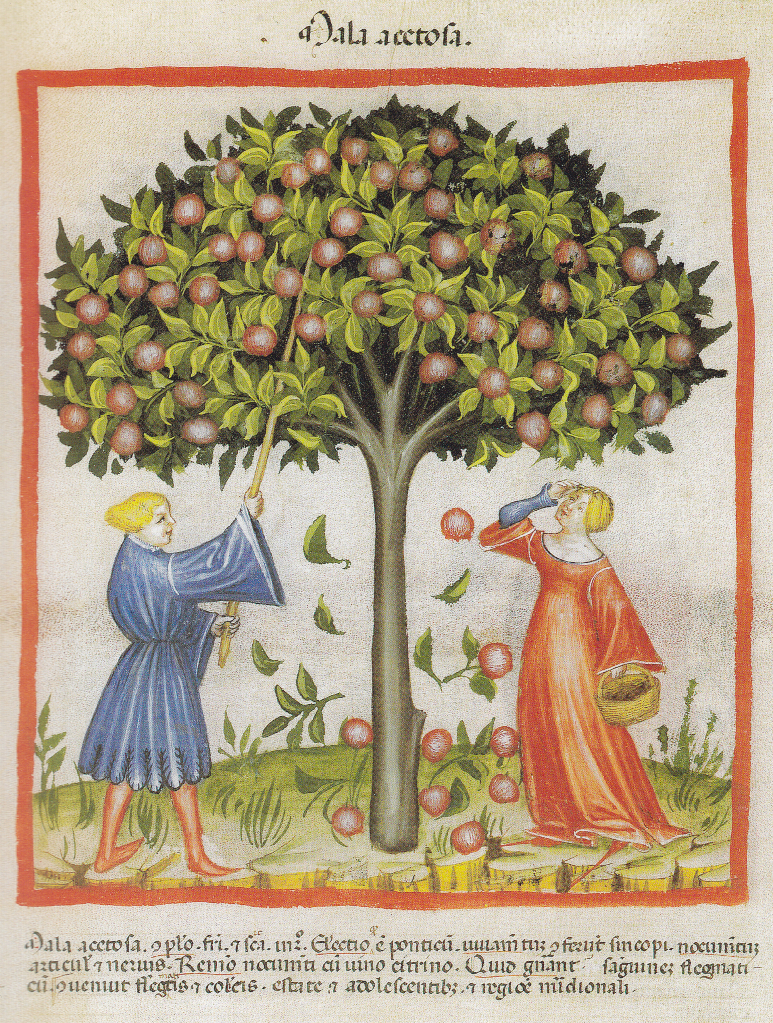 Abbildung der Ernte von sauren Äpfeln